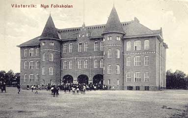 Nya Folkskolan, senare Marieborgsskolan i Västervik. Färdigställande 1913. Arkitekter Gustaf de Frumerie och Kristian Sundstrand.